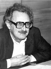 Фотография Симона Львовича Соловейчика, с разрешения сына, Артема Соловейчика